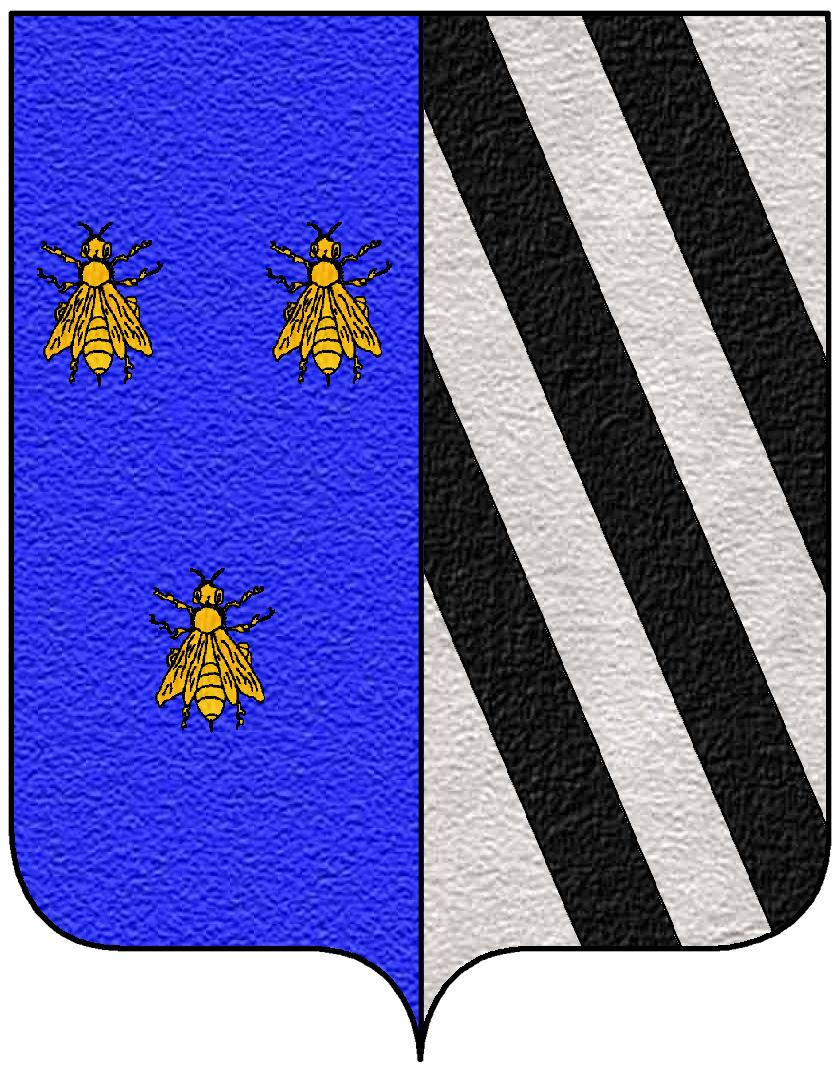 Stemma della famiglia Barberini